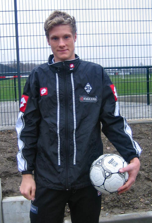 Marcell Jansen Foto/Urheber: Gregor Kaczmarek Quelle: Eigene Aufnahme